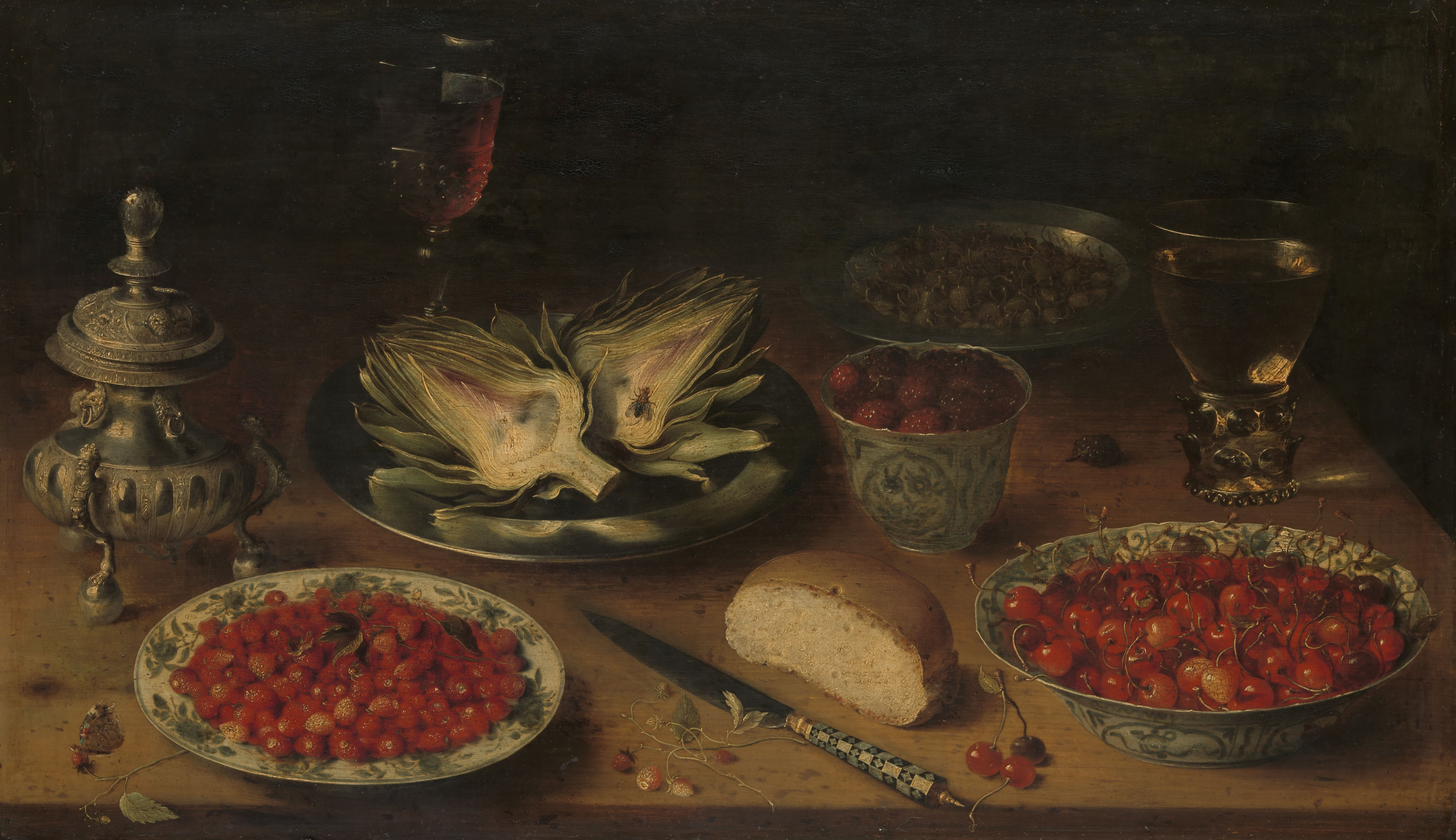 Stilleven met schotels en koppen van Chinees porselein waarin aardbeien, kersen en moerbeien. Op een tinnen bord ligt een doorgesneden artisjok, daarnaast een mes, een stuk brood, twee glazen en een zilveren suikerpot. Verder een vlieg en een vlinder.